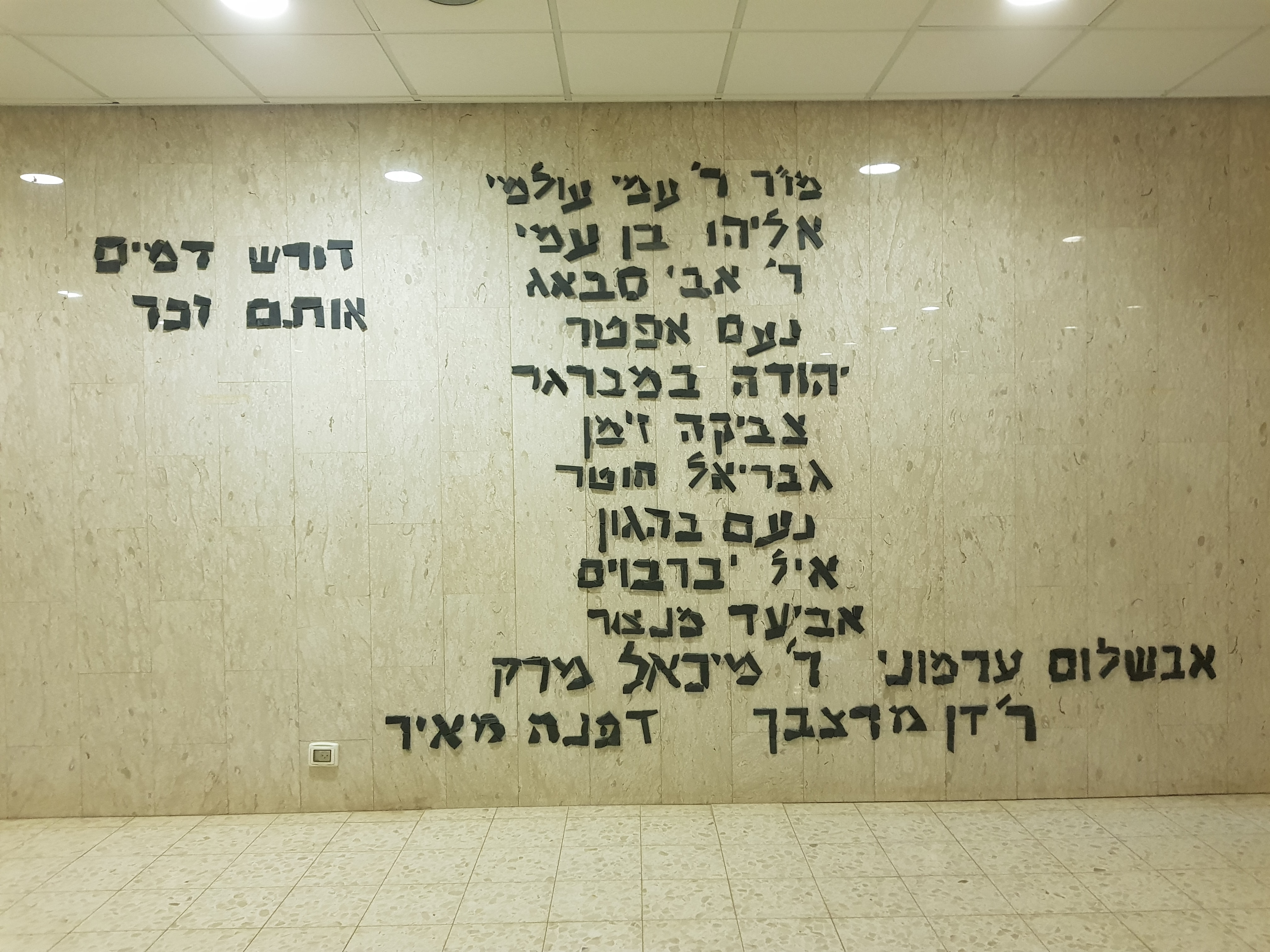 קיר הזכרון בישיבת עתניאל, מעודכן לשנת תשע"ח